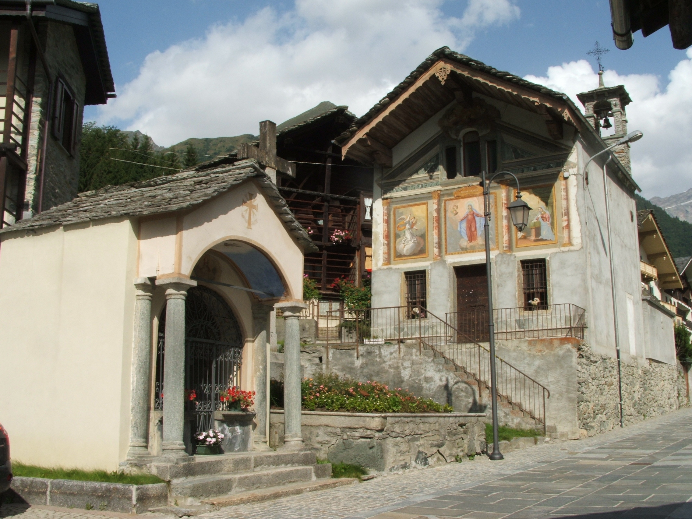 Immagine da Alagna Valsesia